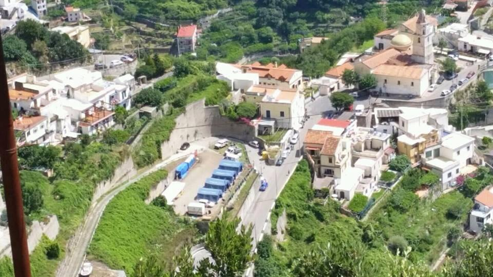 Veduta area di Pogerola